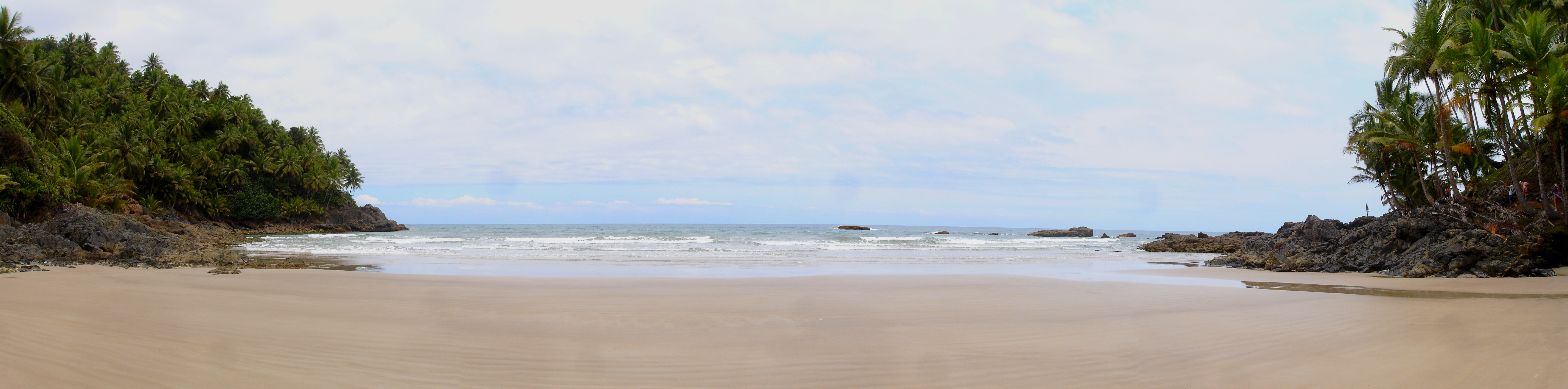 Vista para o mar em Itacaré, panorâmica - Itacaré BA (2009)